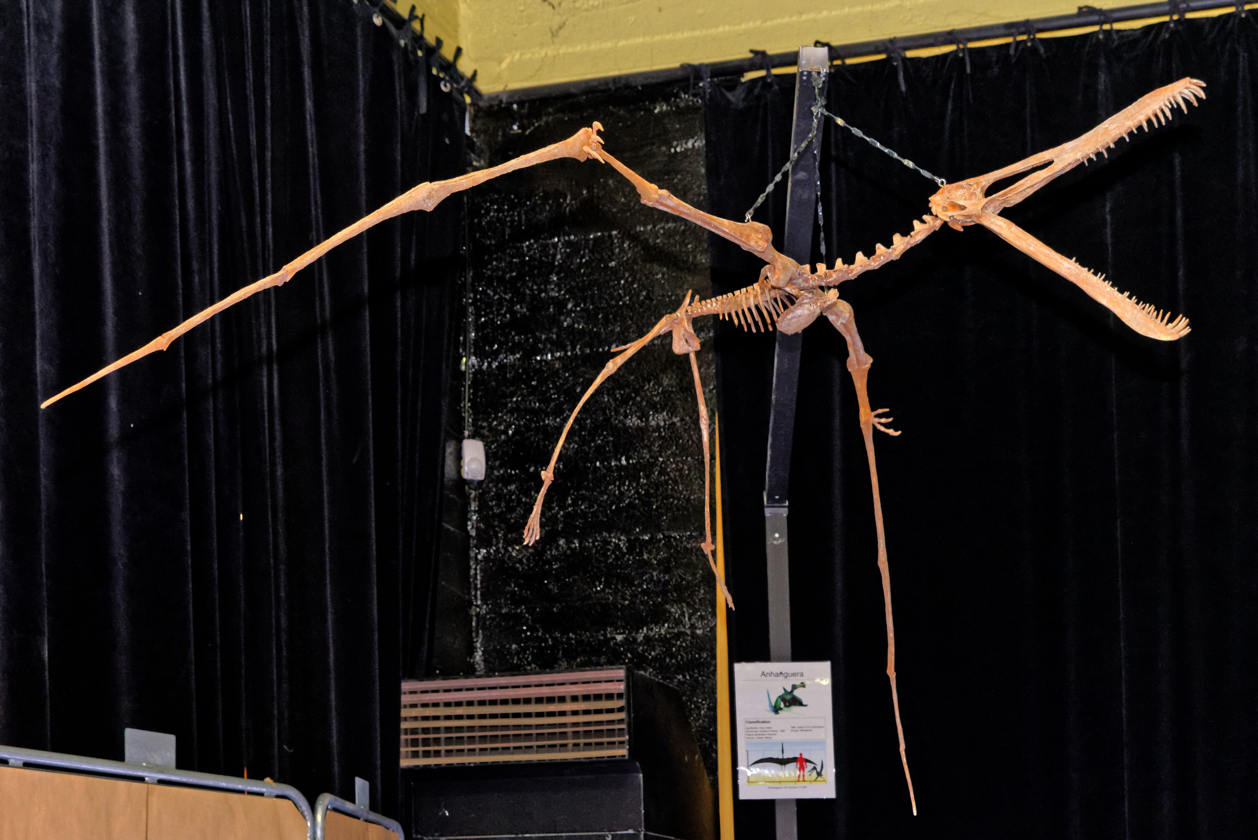 Moulage d'anhanguera. Exposition "Les reptiles volants au temps des dinosaures" organisée par la Société de Minéralogie et Paléontologie Dijonnaise (Dijon, Côte d'Or, Bourgogne, France)